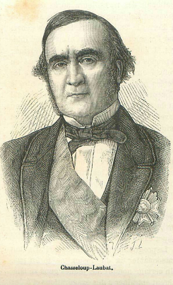 Portrait du sénateur Prosper de Chasseloup-Laubat.